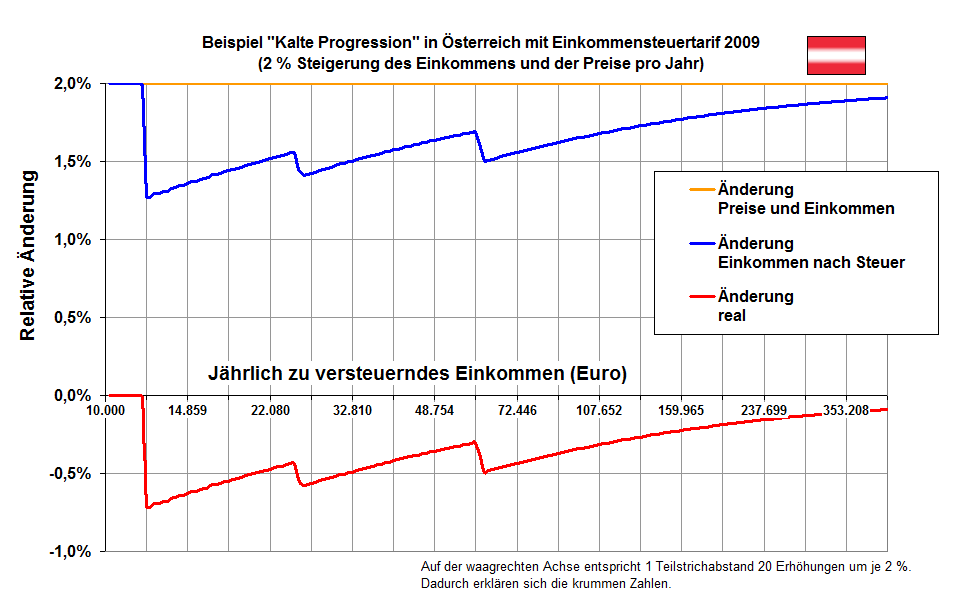 Beispiel zur "kalten Progression" in Österreich bei angenommenen Steigerungsraten von 2 %/Jahr für Preise und Einkommen. Als Basis dient der Einkommensteuertarif 2009.